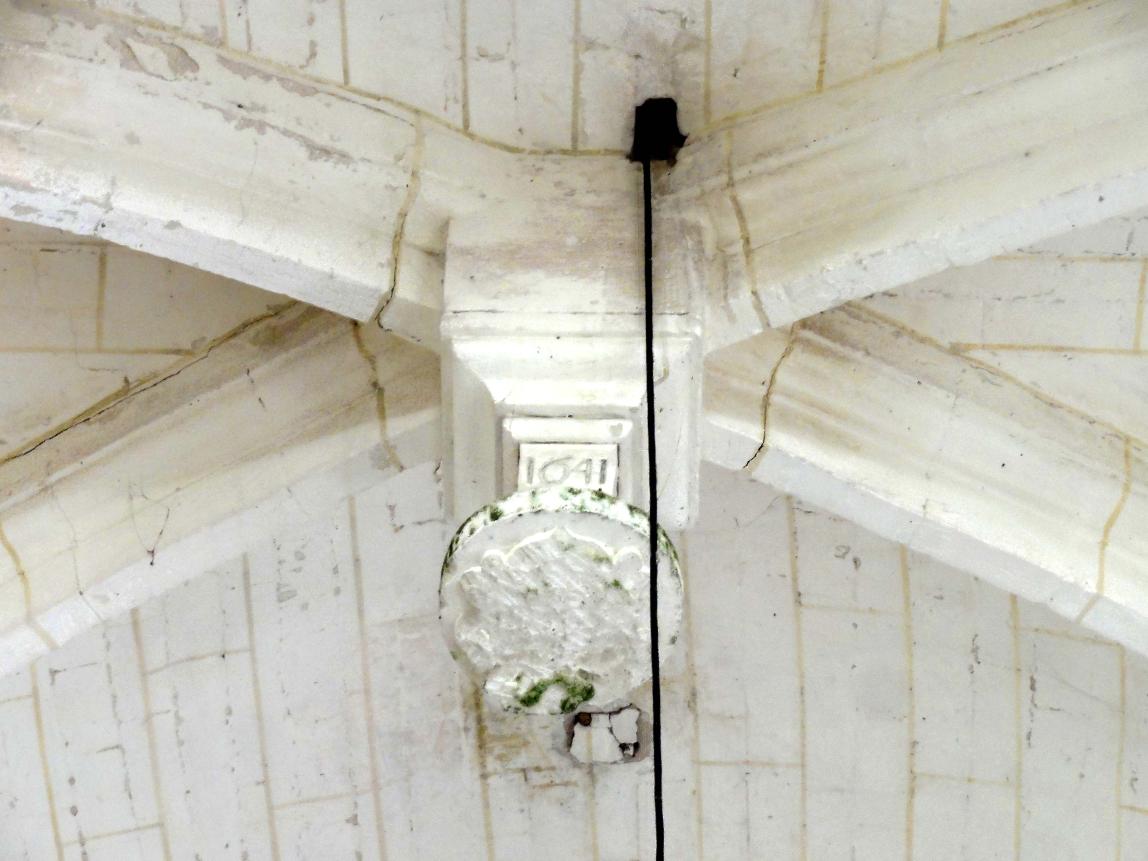 Clé de voûte - voir titre.